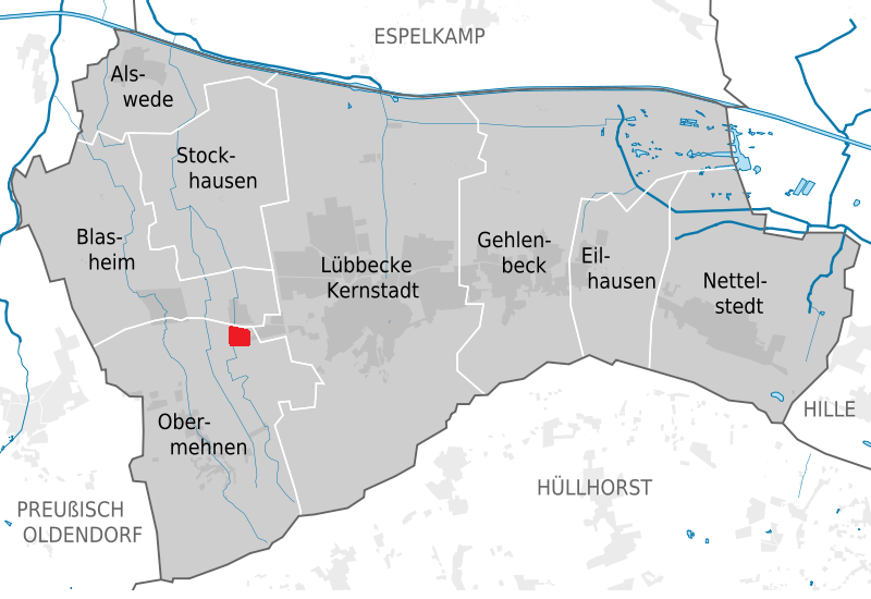 Lage des Blasheimer Marktes